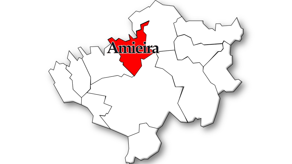 População